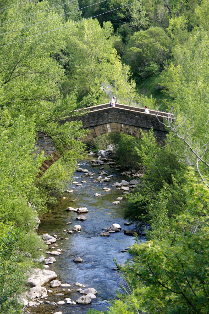 riu Isàvena